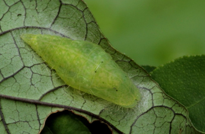 PLUM JUDY (Abisara echerius)